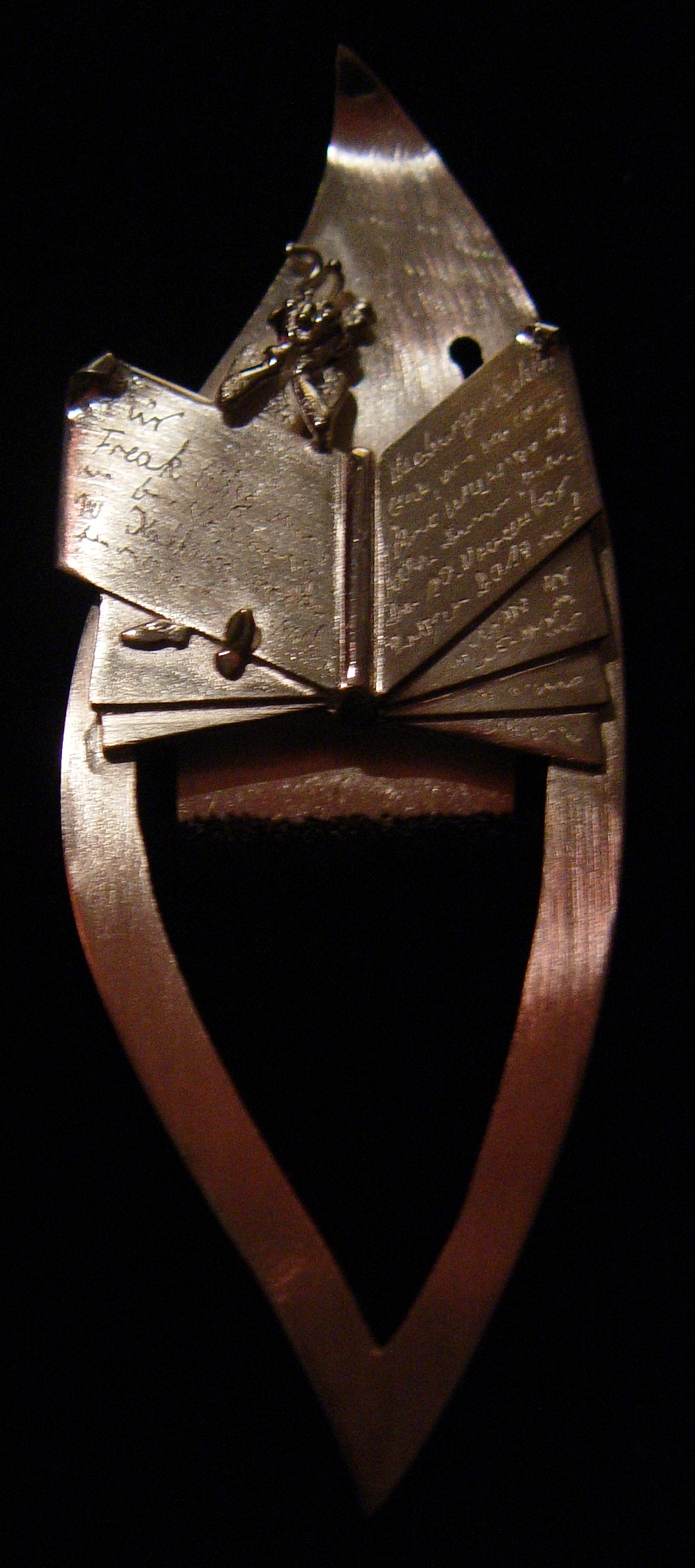 Foto des Harzburger Eselsohr 2010